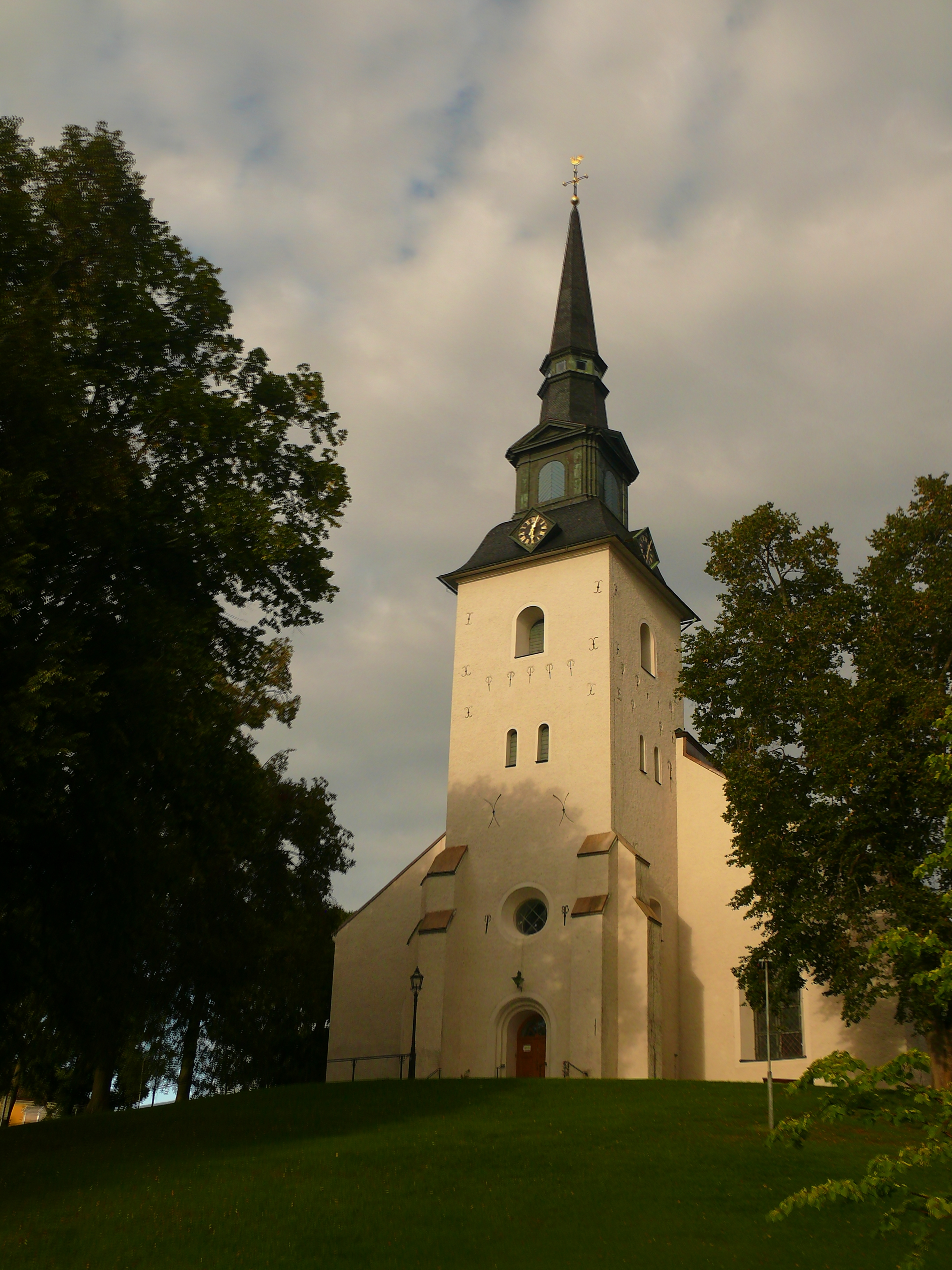 kościół w Lindesbergu, Szwecja